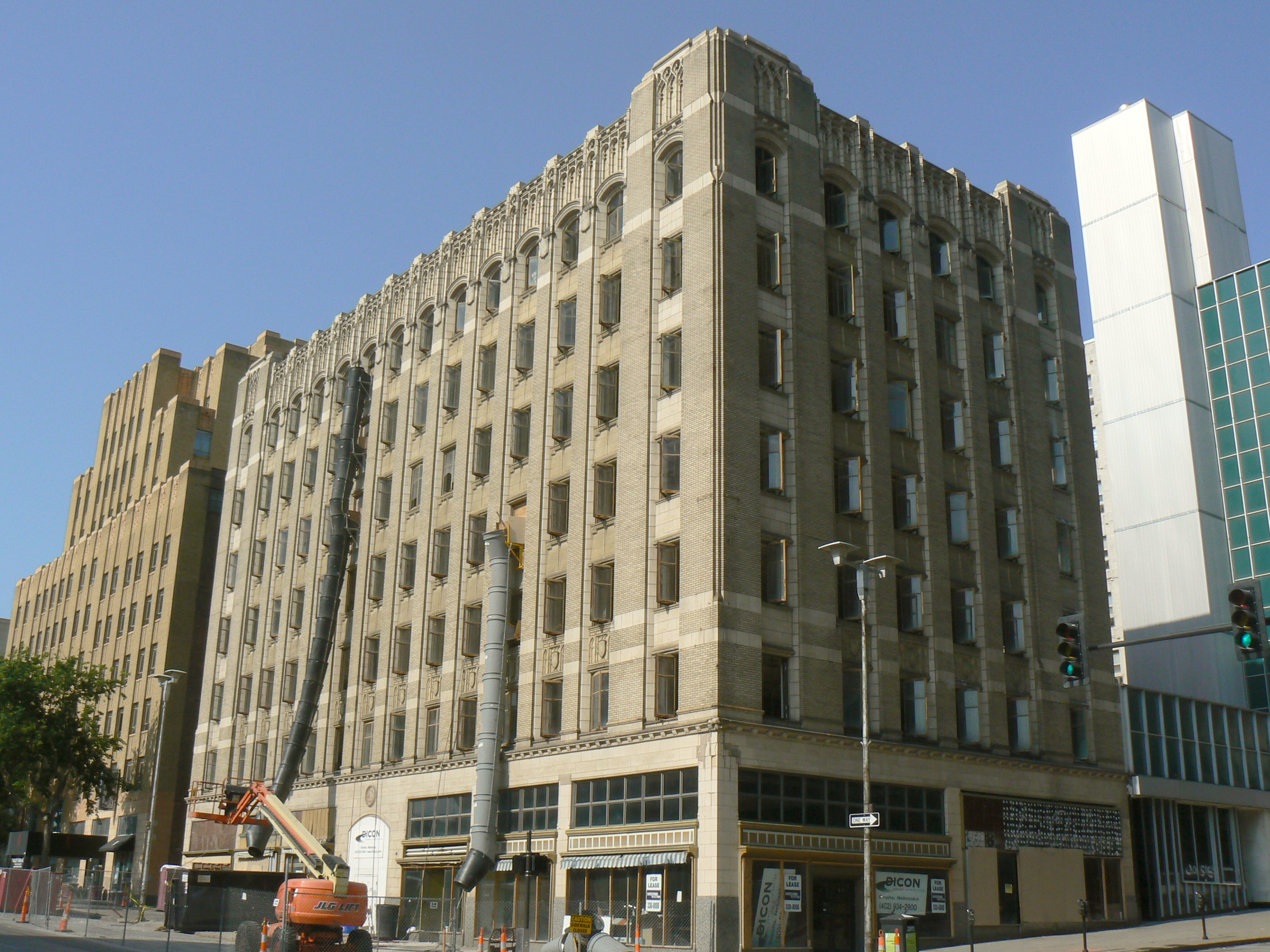 Barker Building in Omaha, Nebraska